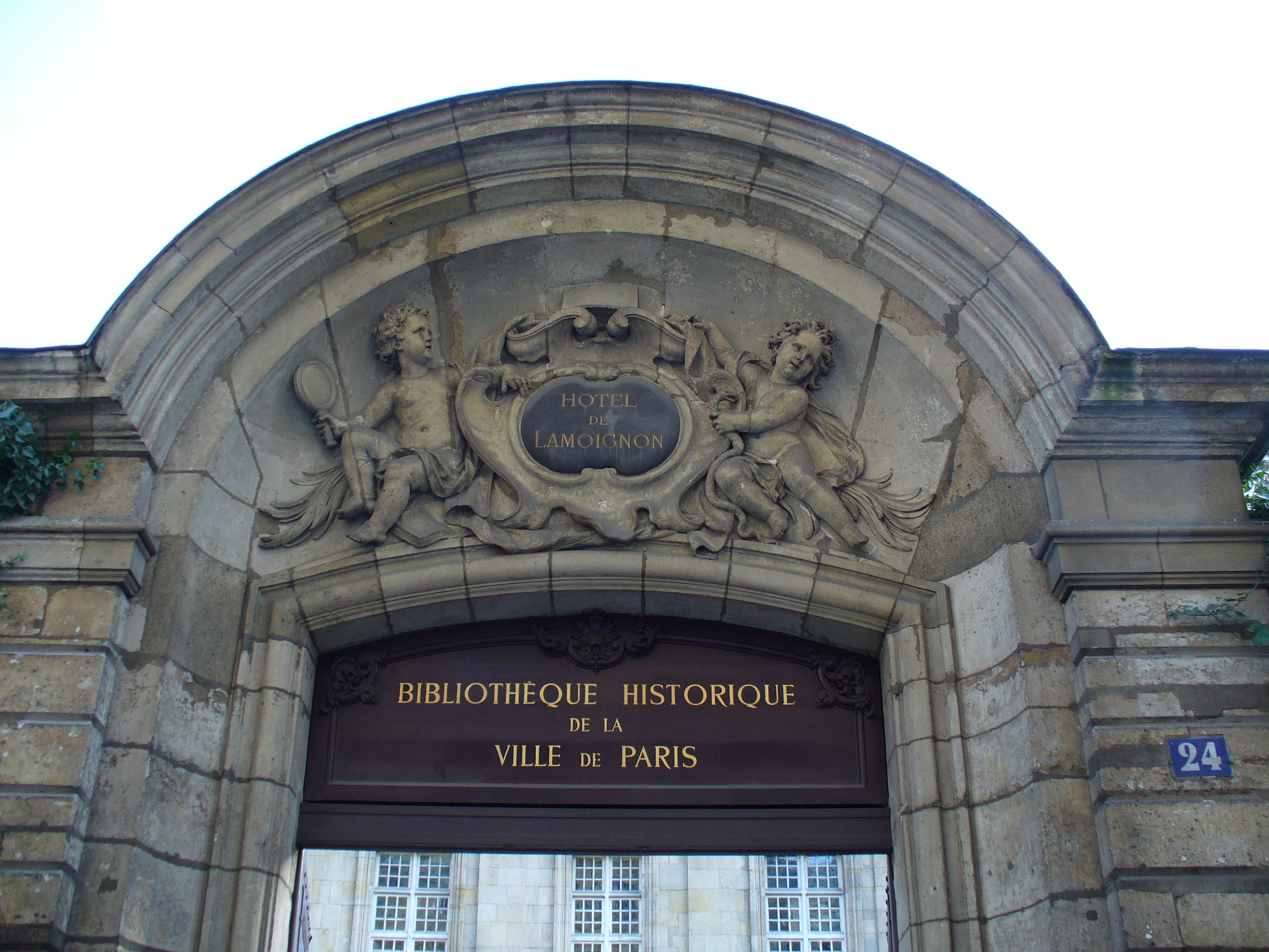 Portail de l'hôtel de Lamoignon (actuellement occupé par la Bibliothèque historique de la Ville de Paris), 24 rue Pavée, Paris 4e arrondissement.